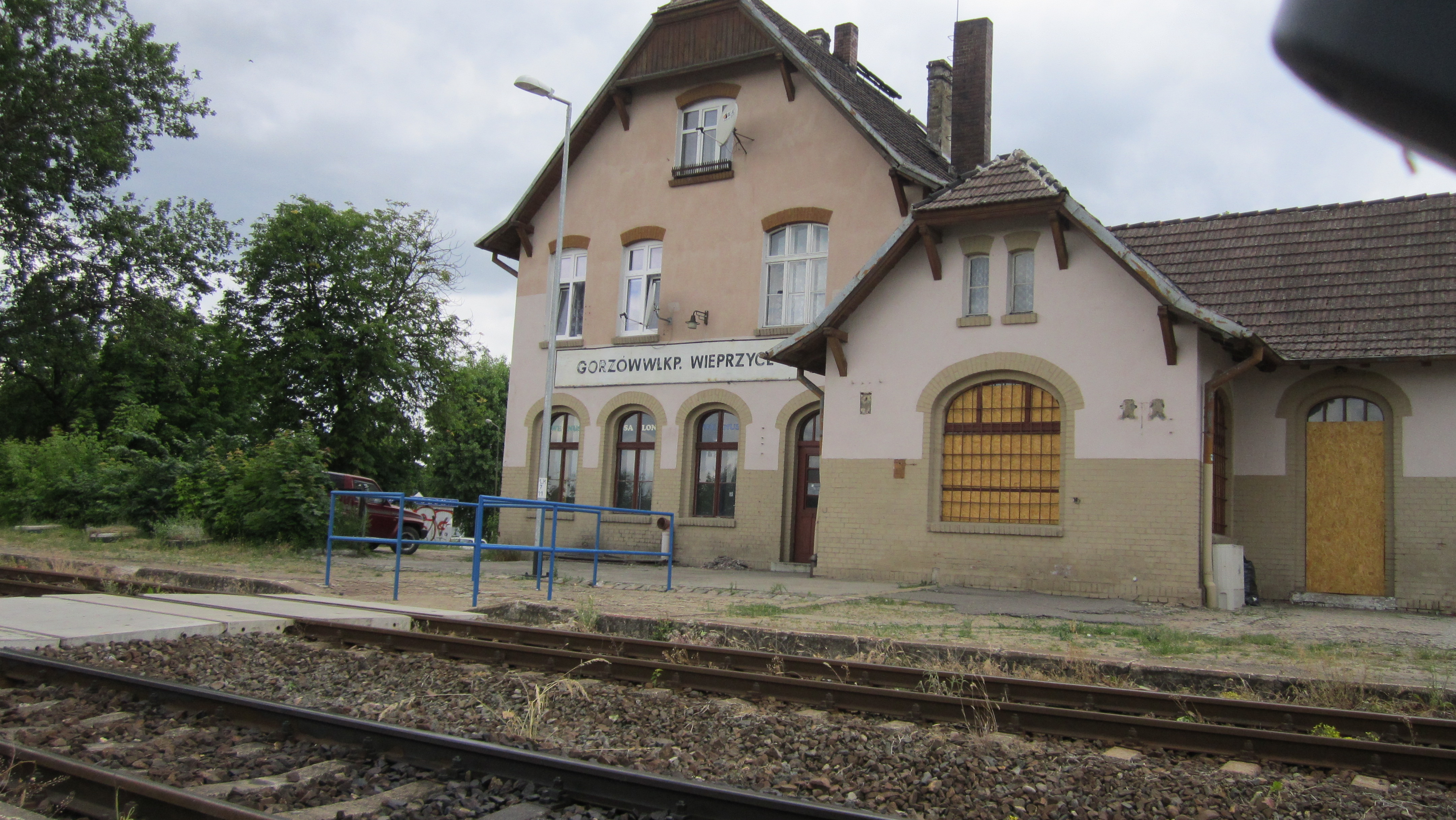 Stacja Gorzów Wielkopolski Wieprzyce